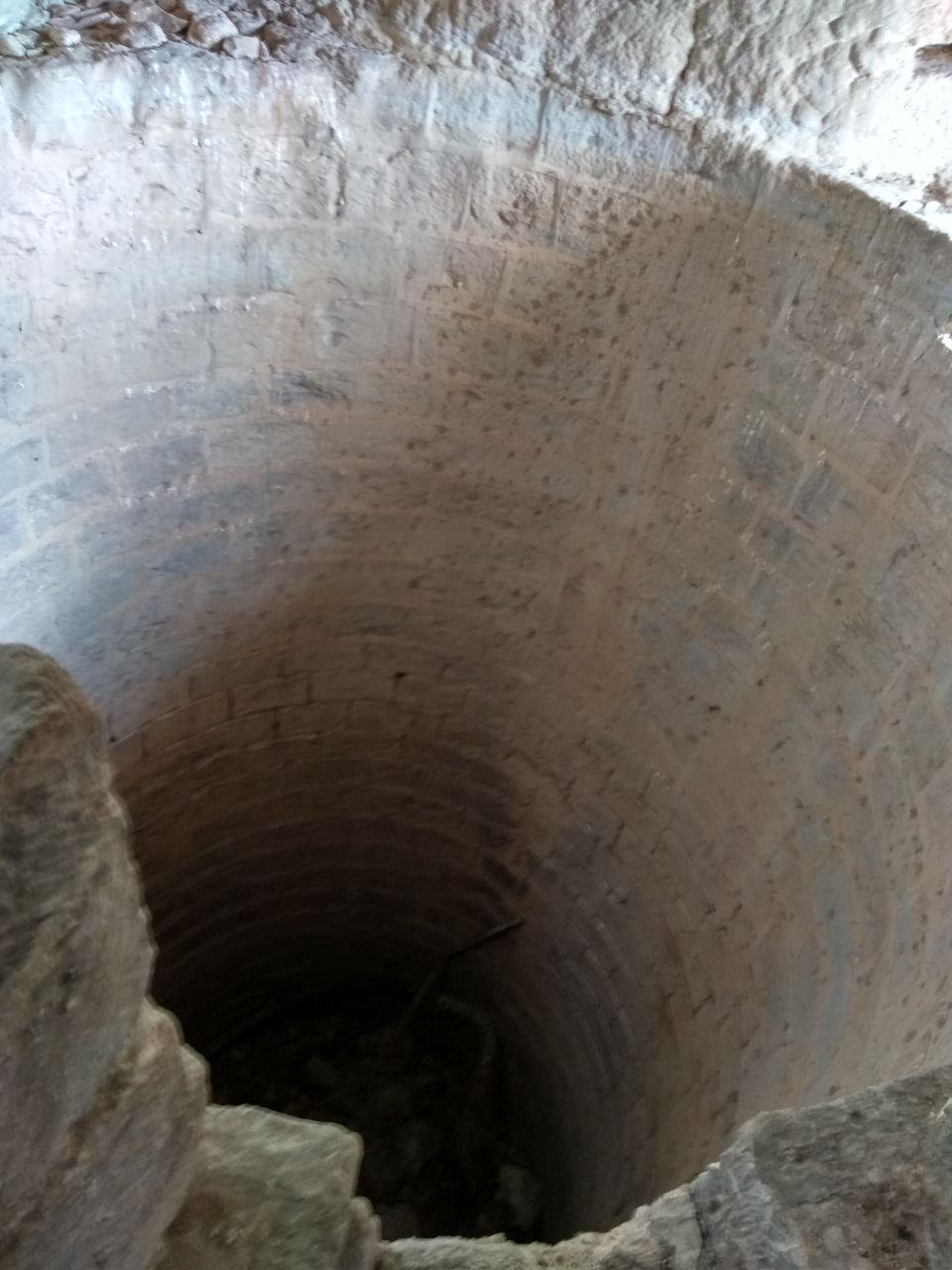 הבור שאליו מיוחס הסיפור המקראי על השלכת יוסף לבור בעמק דותן